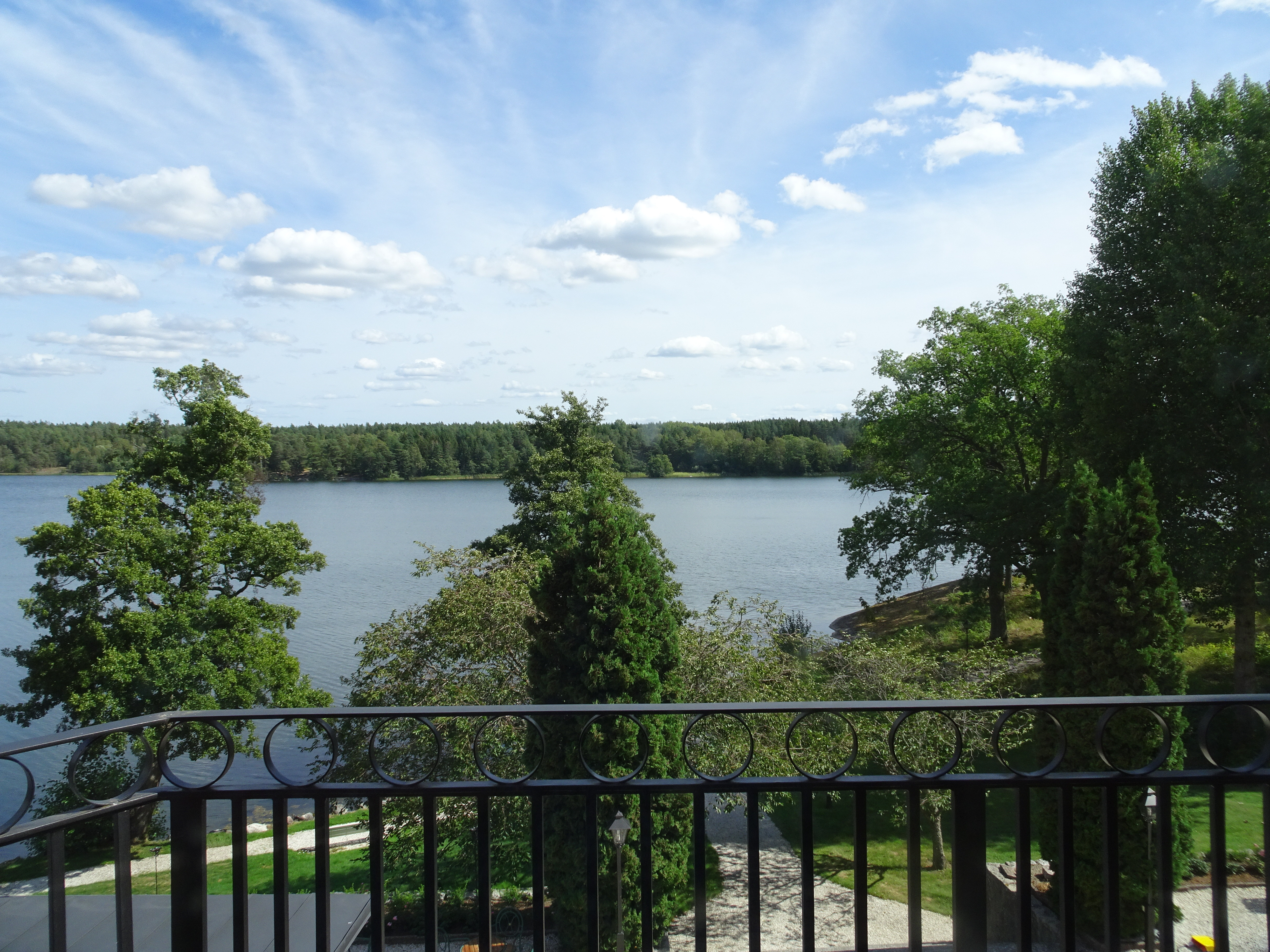 Lejondalssjön sedd från Lejondals slott